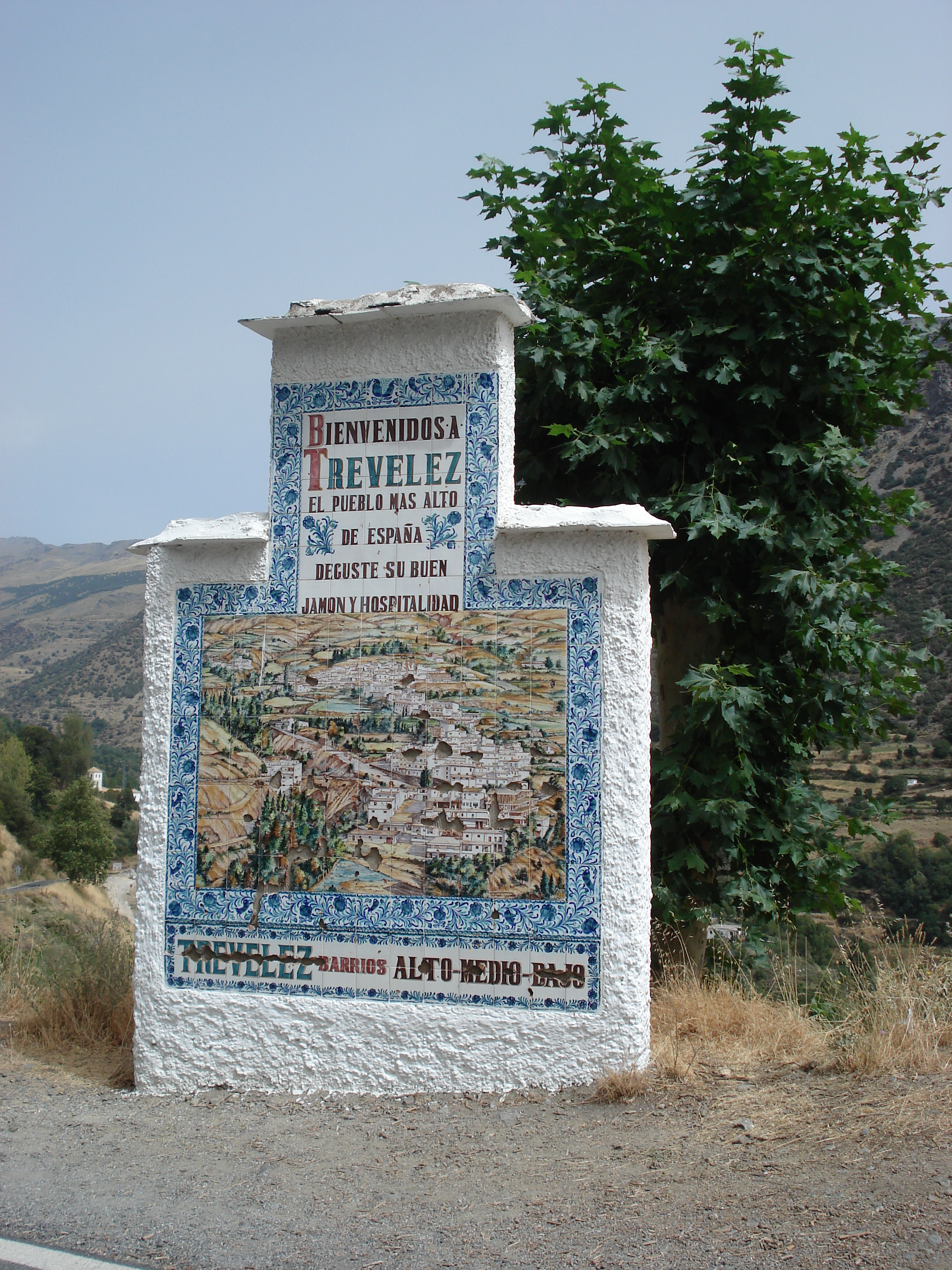 Trevélez, en Granada (España)